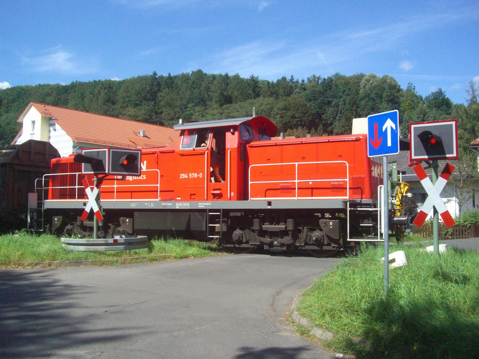 294 578-0 Güterzug auf dem Bahnübergang Bad Hersfeld-Kurpark (An der Unterau)